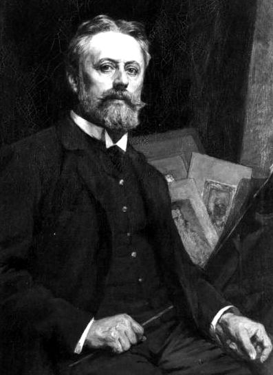 Selbstporträt des Künstlers Alfred Cluysenaar